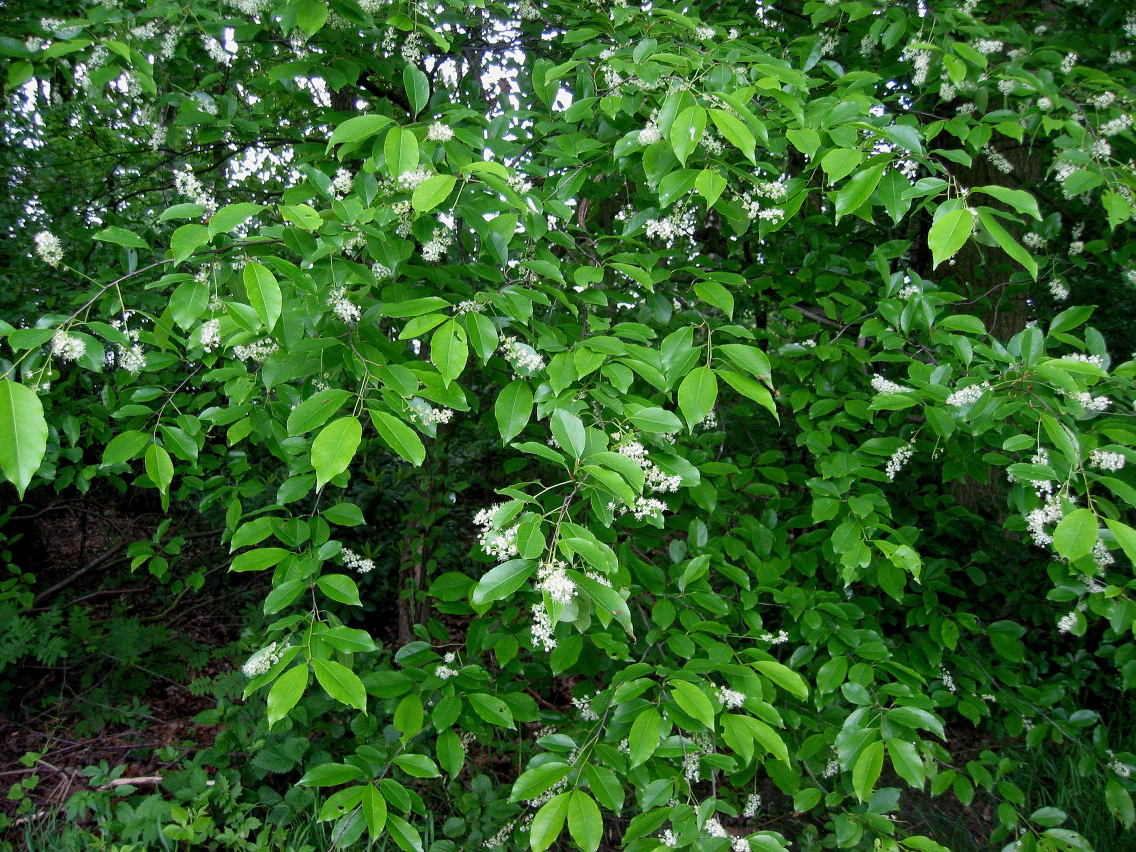 (Amerikaanse vogelkers) Prunus serotina